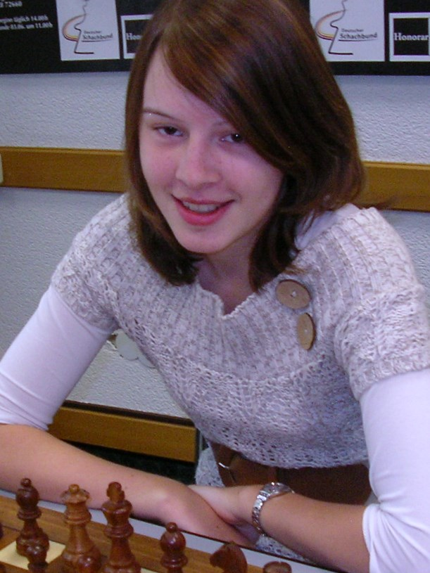 Hanna Marie Klek, 2011 in Bonn bei den Deutschen Schacheinzelmeisterschaften.